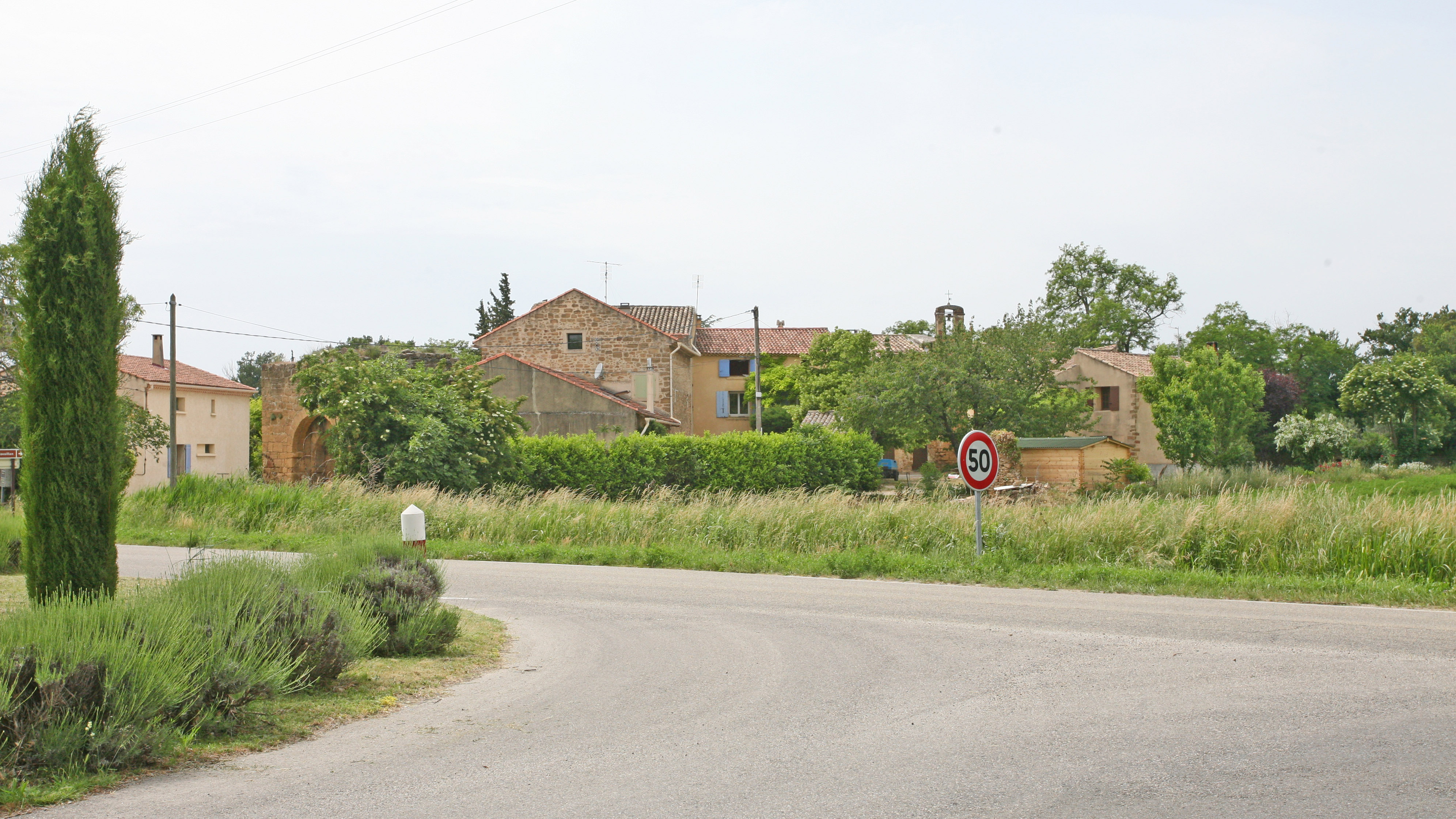 Hameau du vieux Travaillan (commune de Vaucluse)